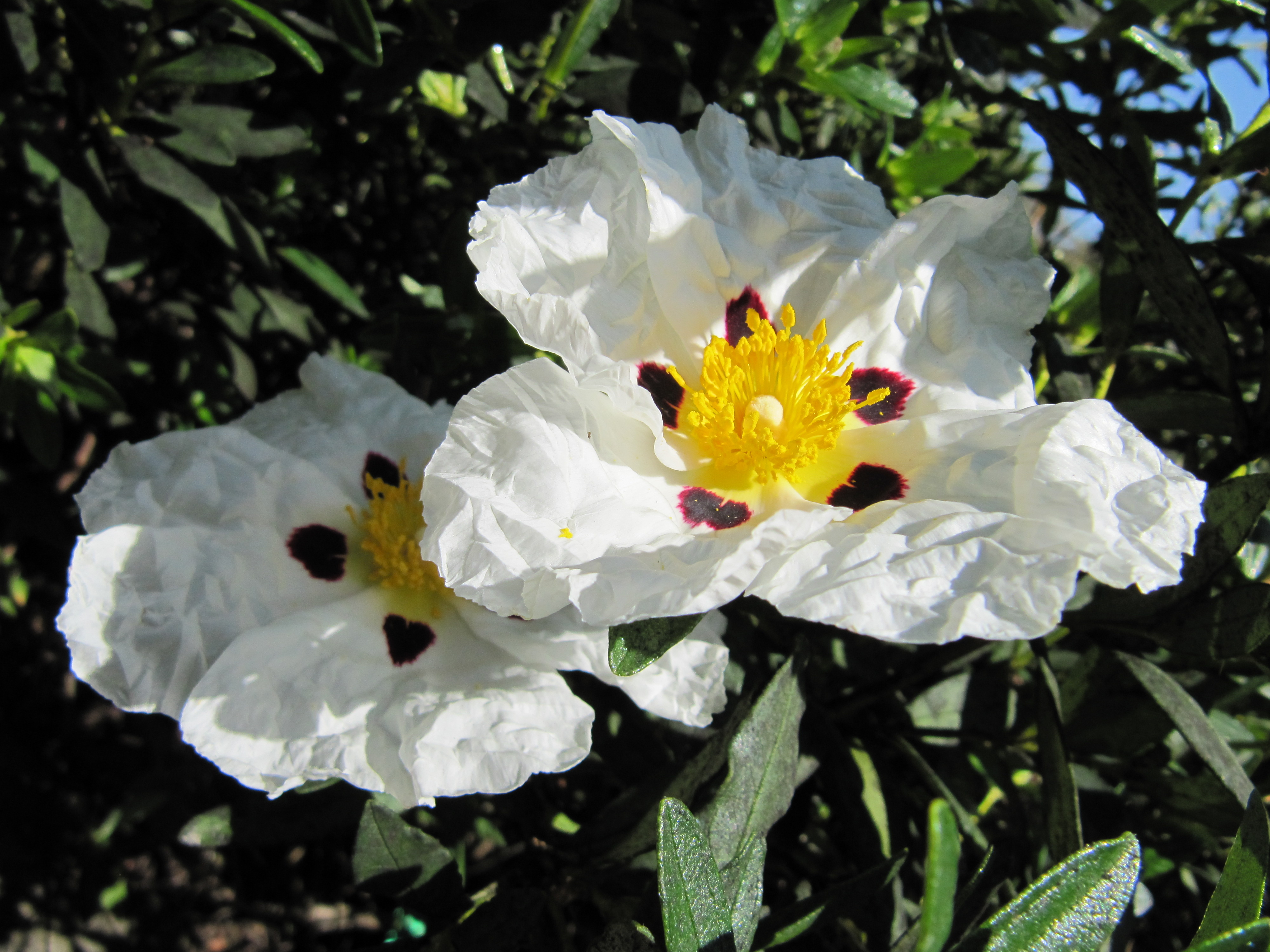 Lack-Cistrose, bot. Cistus ladanifer ssp. culcatus